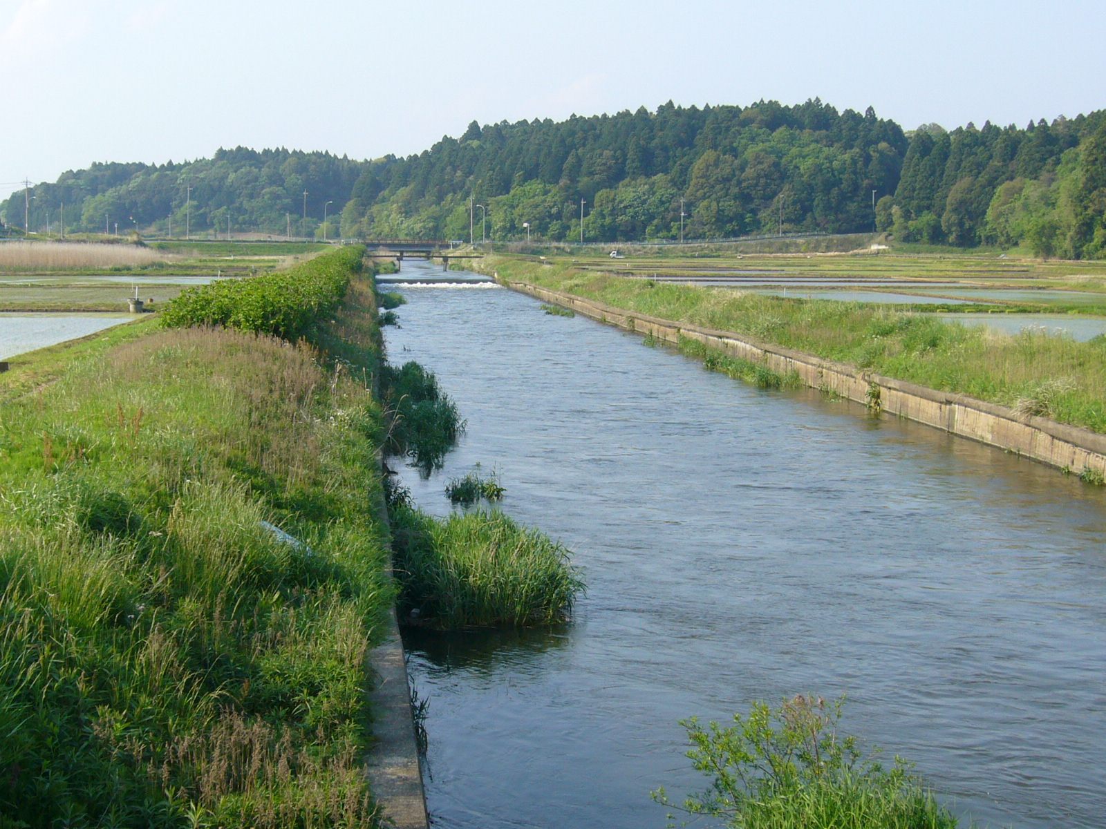 kuriyama river(kurimoto),katori-city,japan